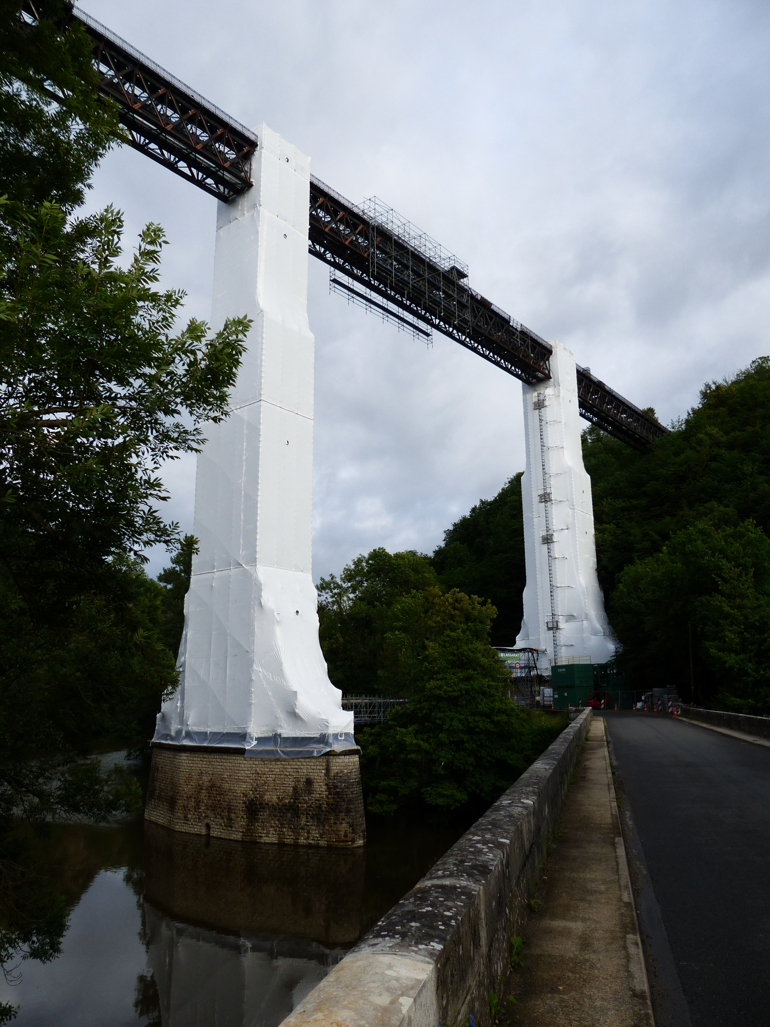 Viaduc de Rouzat (Allier, France) sur la Sioule. Vue en direction de l'est. Travaux de maintenance en juillet 2013.